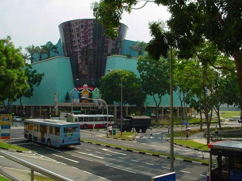 Hougang mall, Singapore. By Timo Sippala 2002